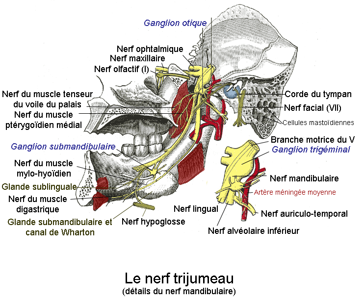 Nerf mandibulaire. VUe médiale. Anatomie humaine